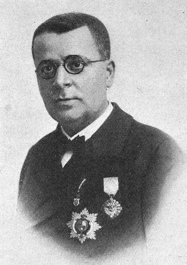 Ramón Ferreiro Lago, fotografía en Vida Gallega 1934